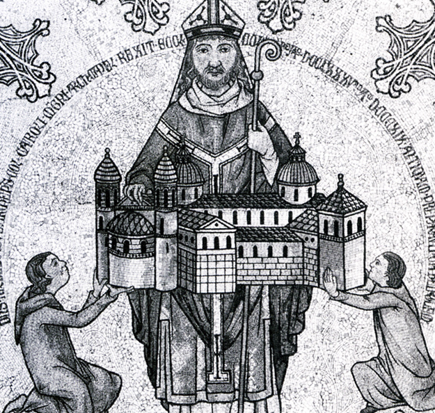 Mosaik aus dem Karolingischen Dom, Erzbischof Hildebold